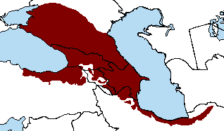 Carte du hotspot Caucase vu par CI